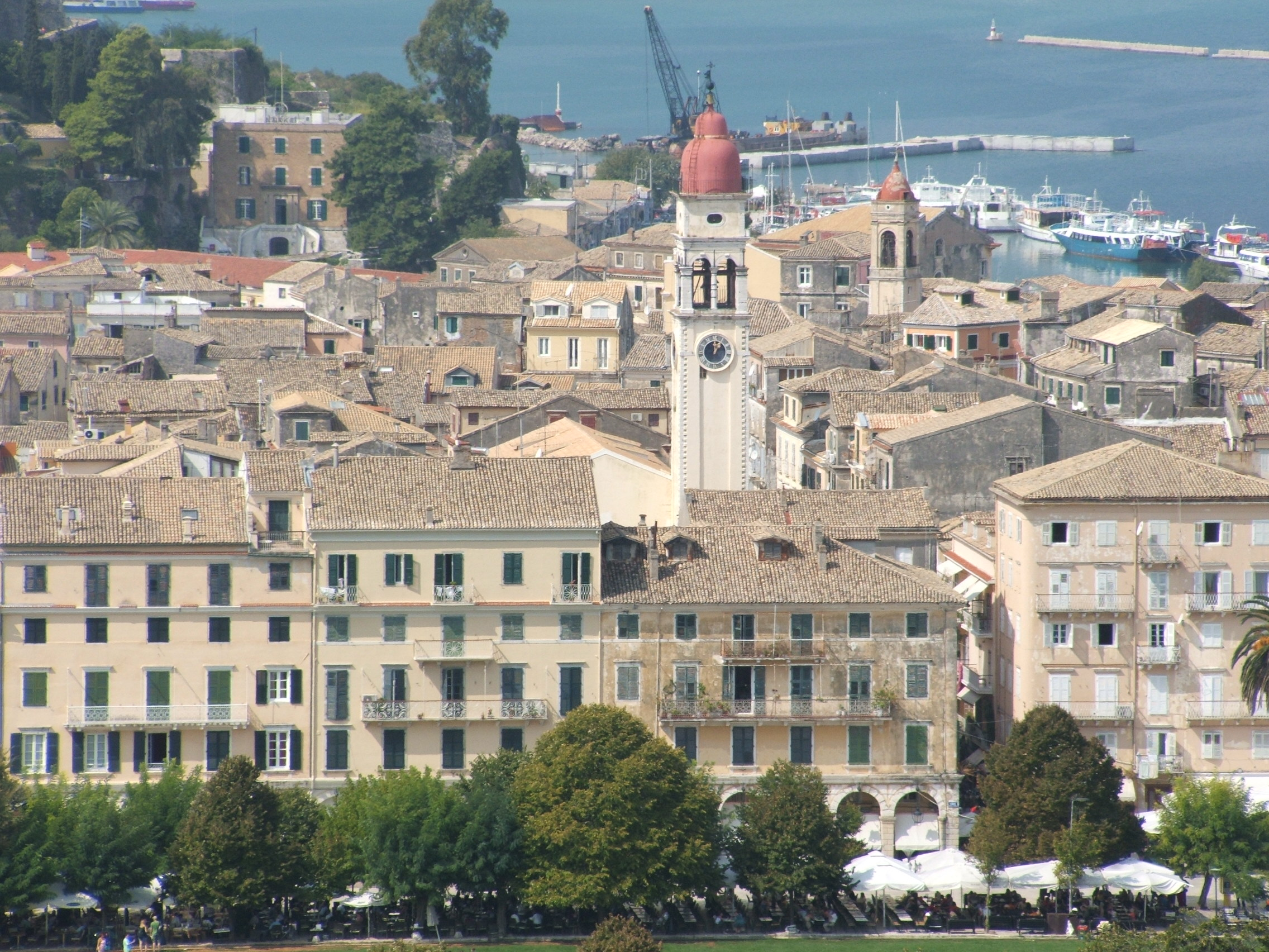 Isla de Corfú (Grecia). Vista de la Ciudad.